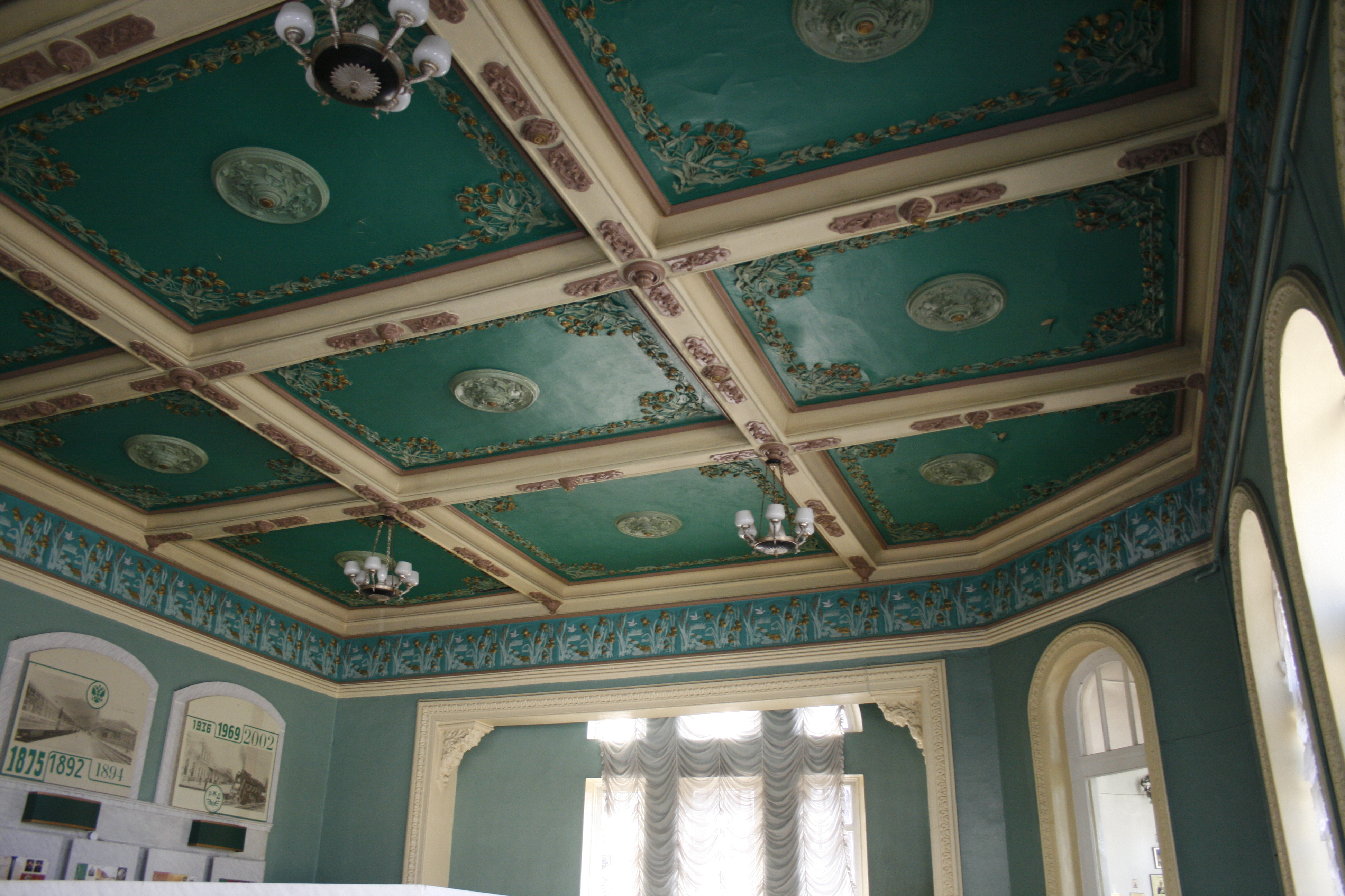 Здание железнодорожного вокзала (Ставропольский край, Кисловодск, вокзальная улица, 13)